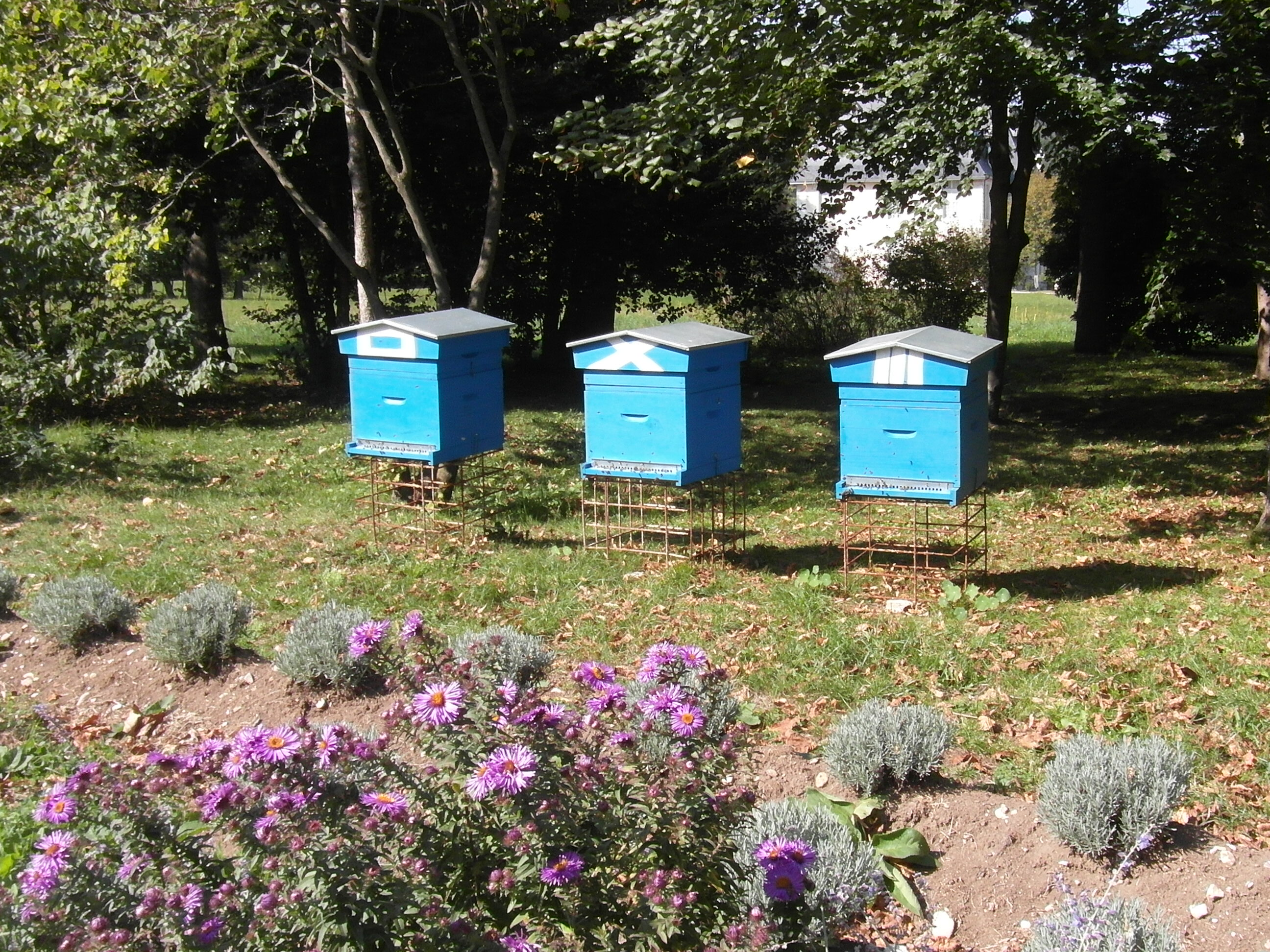 Ruches du château de Sassenage